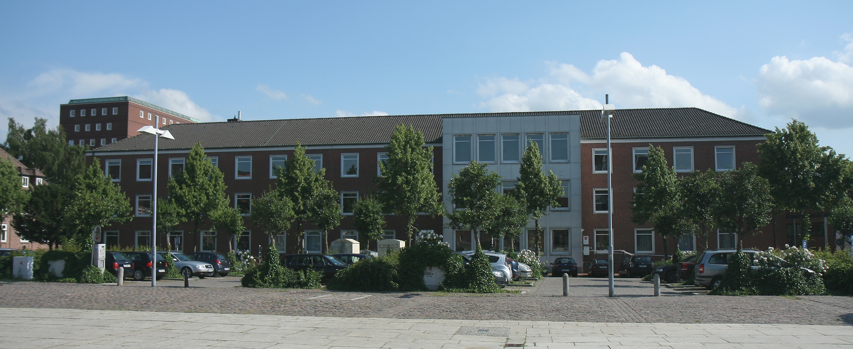 Verwaltungsgericht Stade| und Sozialgericht Stade in Stade, Am Sande 4 a.